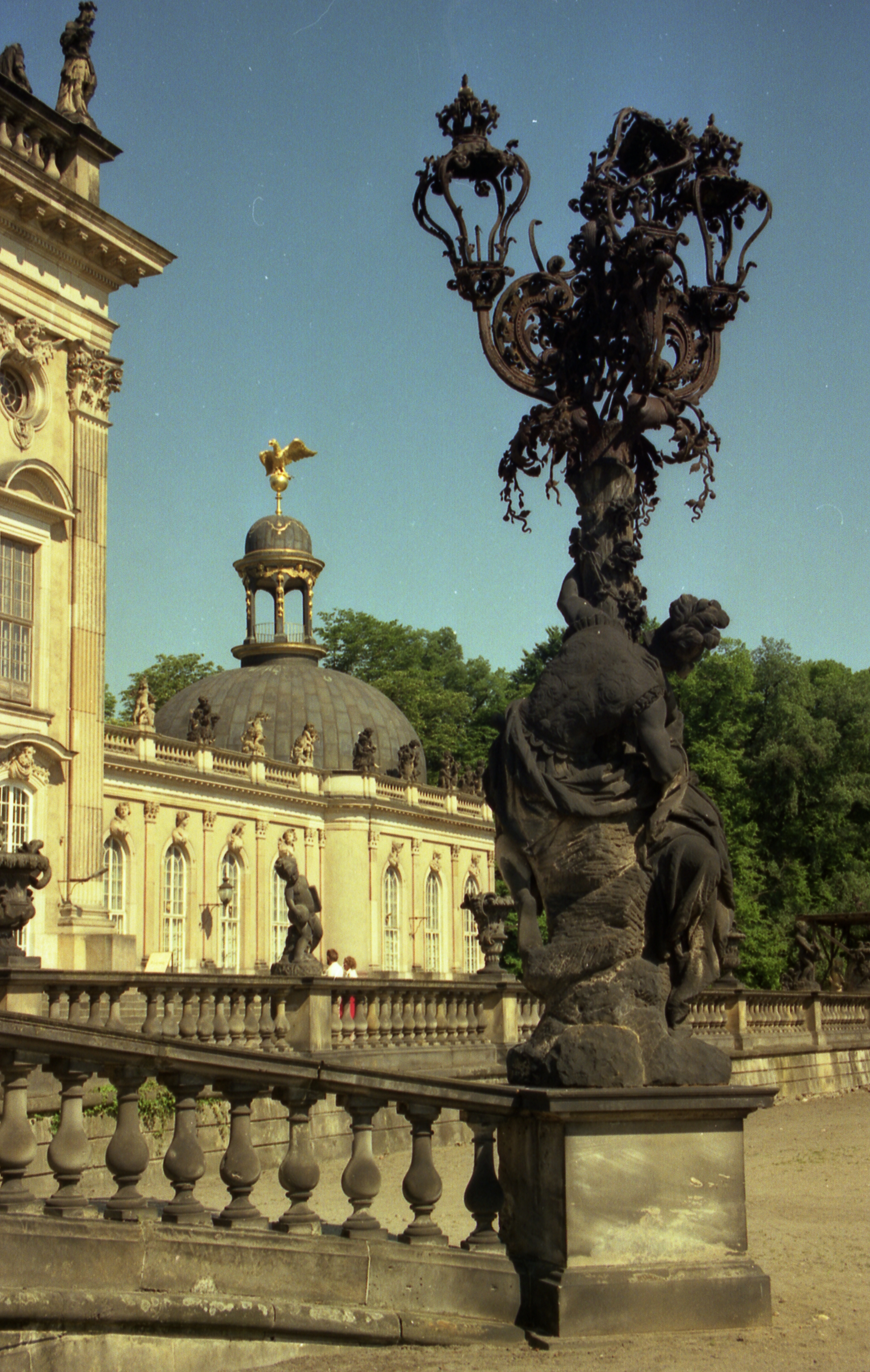 unrenovierte Laterne am Neuen Palais